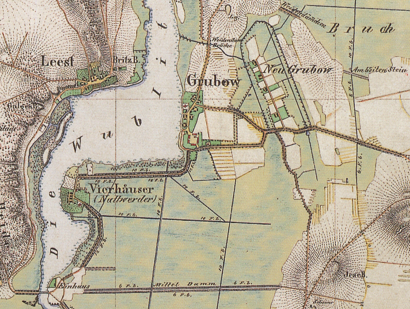 Grube, Stadtteil von Potsdam, Brandenburg, Ausschnitt aus dem Urmesstischblatt 3543 Ketzin von 1839 (inkl. Neu Grube, Nattwerder und Einhaus)